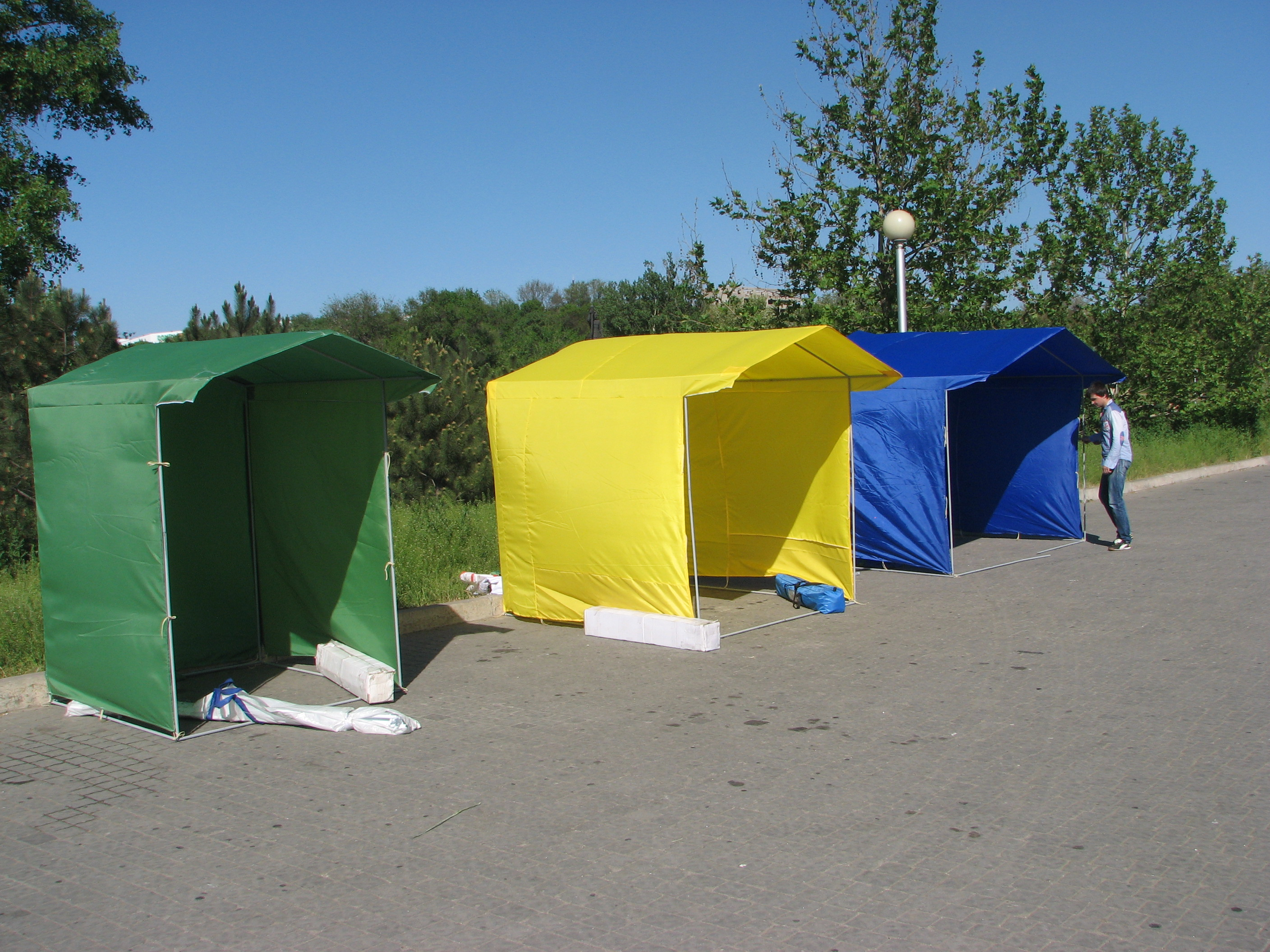 Фотографія торгових палаток у зібраному вигляді.